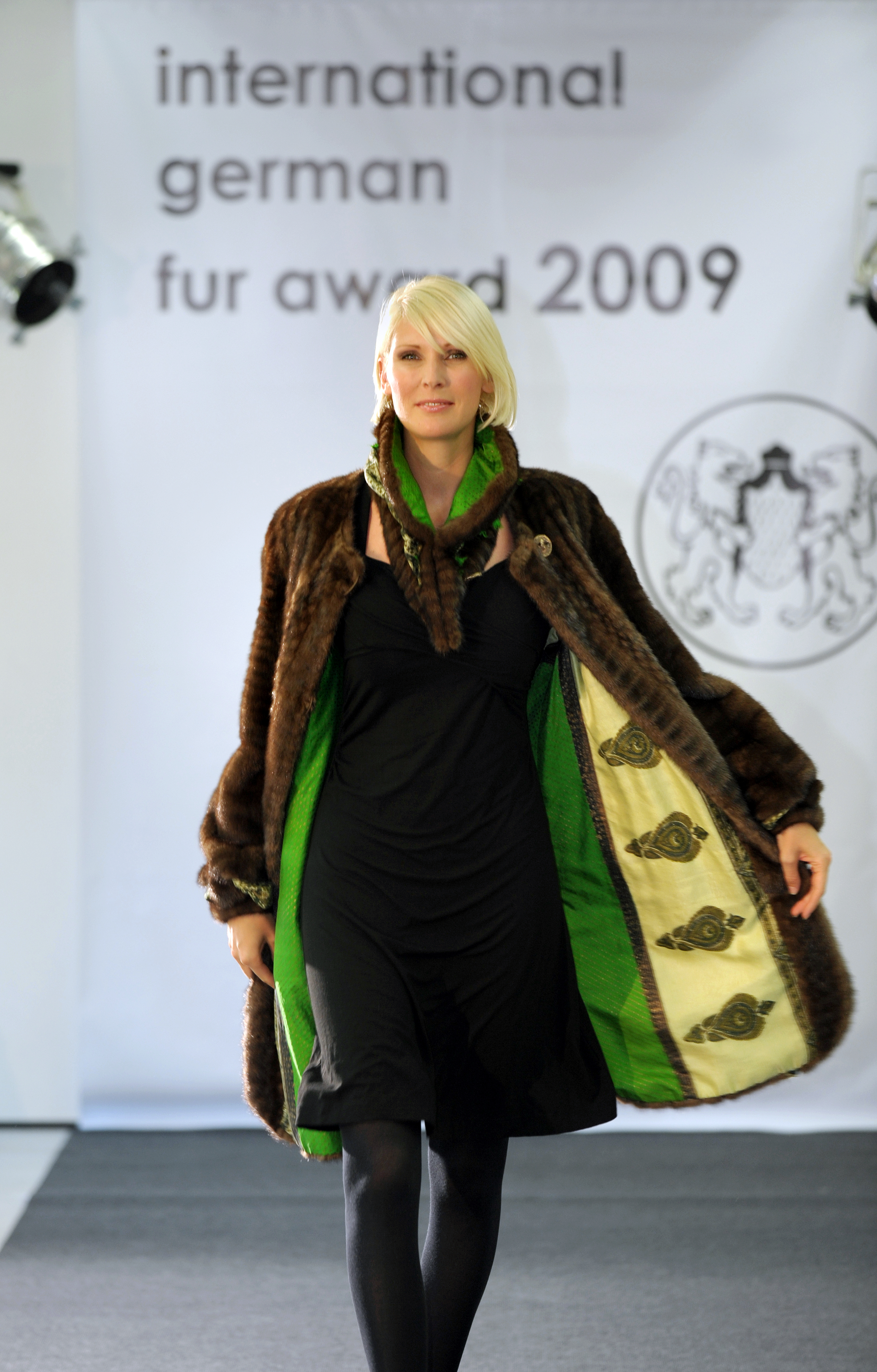 International German Fur Award 2009 des Kürschnerhandwerks.